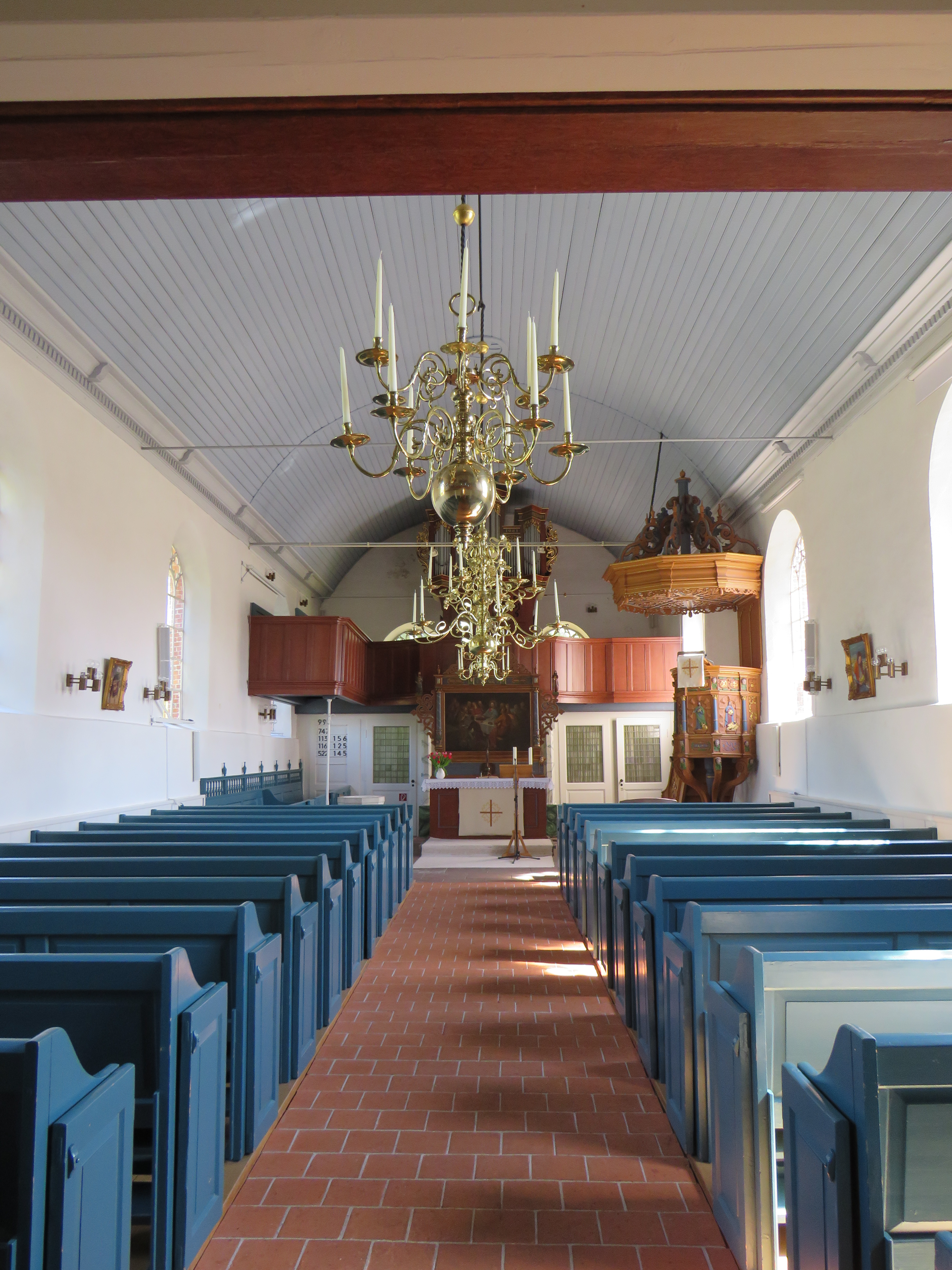 Liudgerikirche Hesel Innenansicht